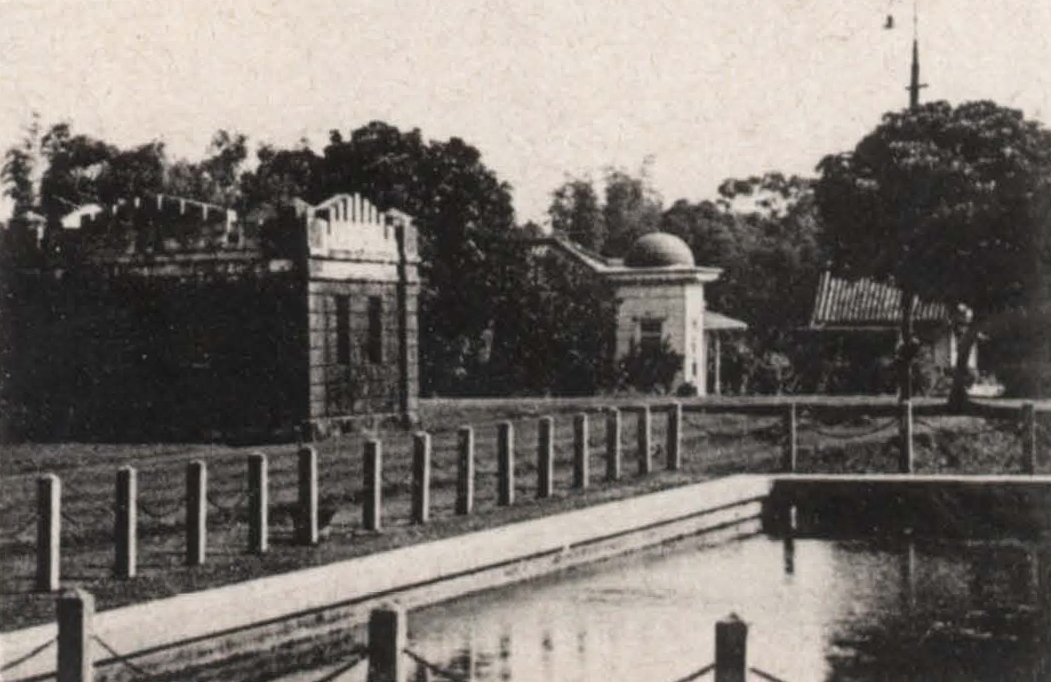 中文（台灣）: 高雄水道水源地位於大樹小坪頂，水源在此井沉澱過濾後再送至高雄市壽山的配水池。